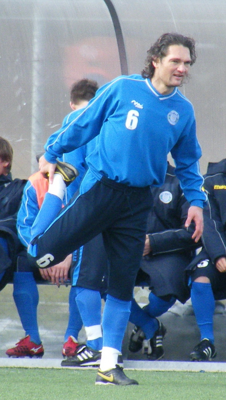 Sorin Botis Romanian football player